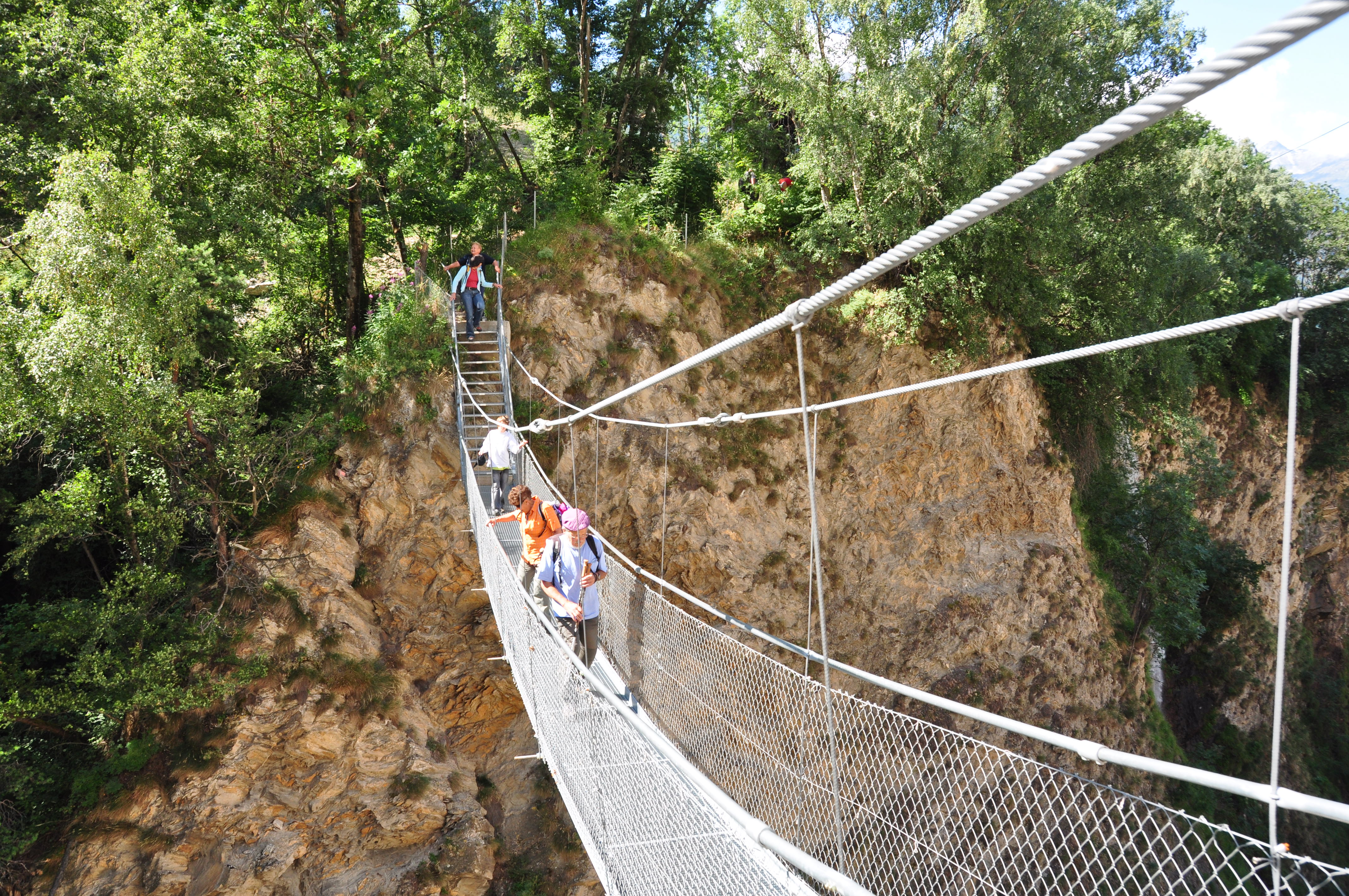 travessia do ponte pencil em Niedergesteln